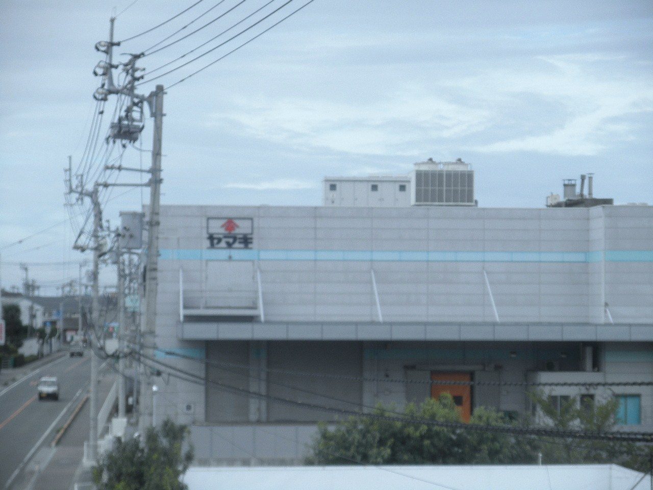 ヤマキ本社